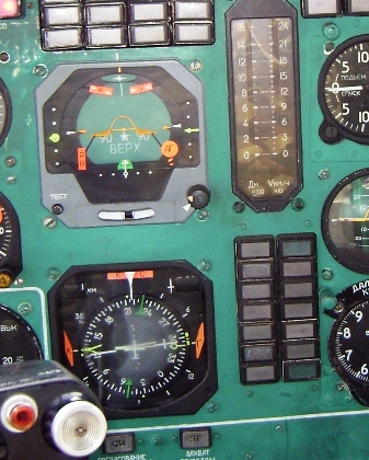 Фрагмент приборной доски вертолёта Ка-27, приборы ПКП-77 и ПНП 72.